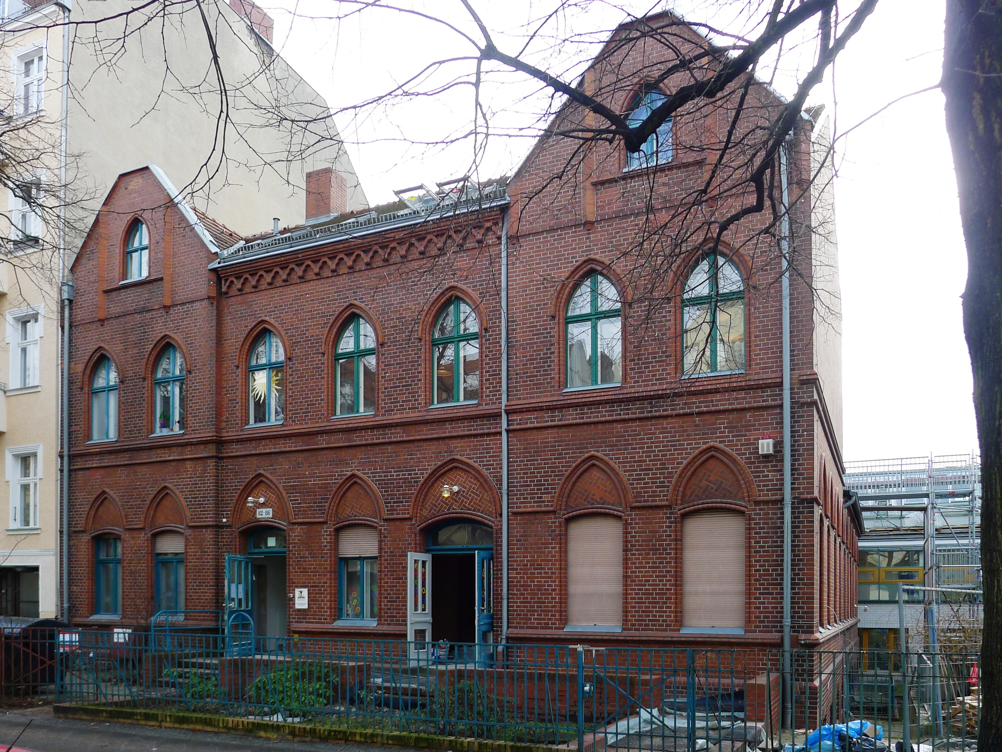 ehemaliges Gemeindehaus mit Marien-Kapelle